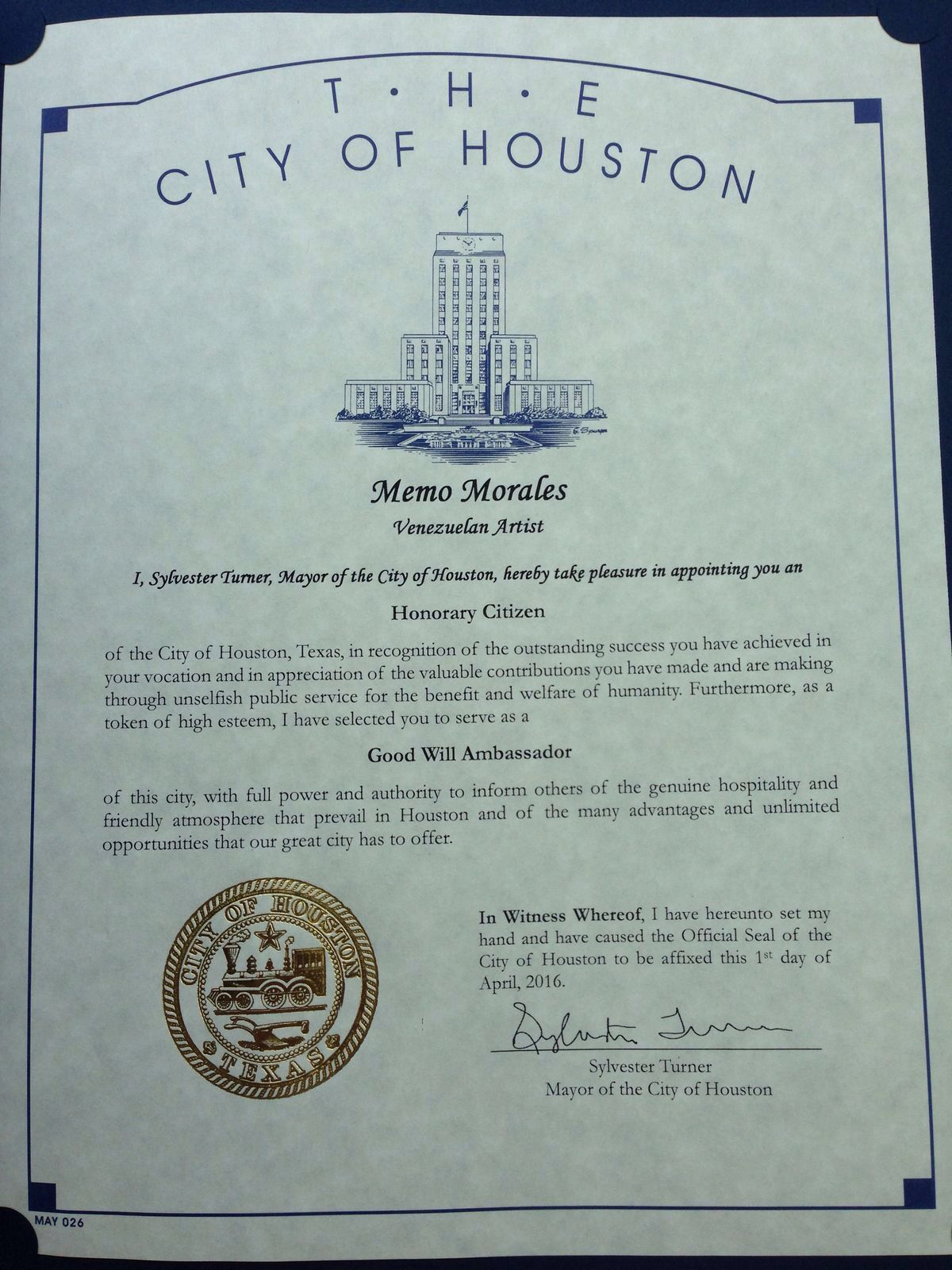 Documento que le acredita como Ciudadano Honorífico y Embajador de Buena Voluntad de la Ciudad de Houston, Texas.